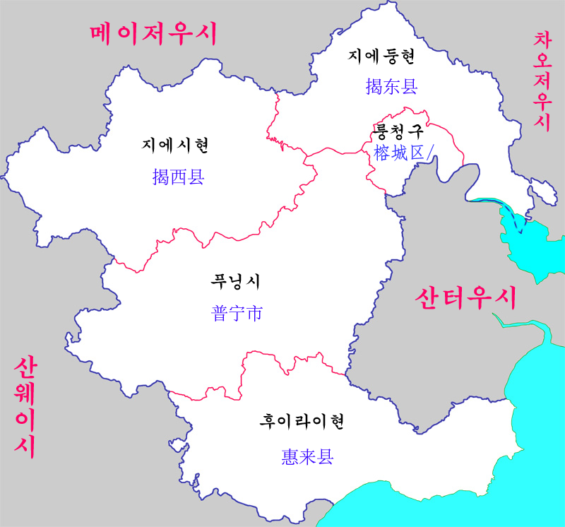 지에양시 현급구역도